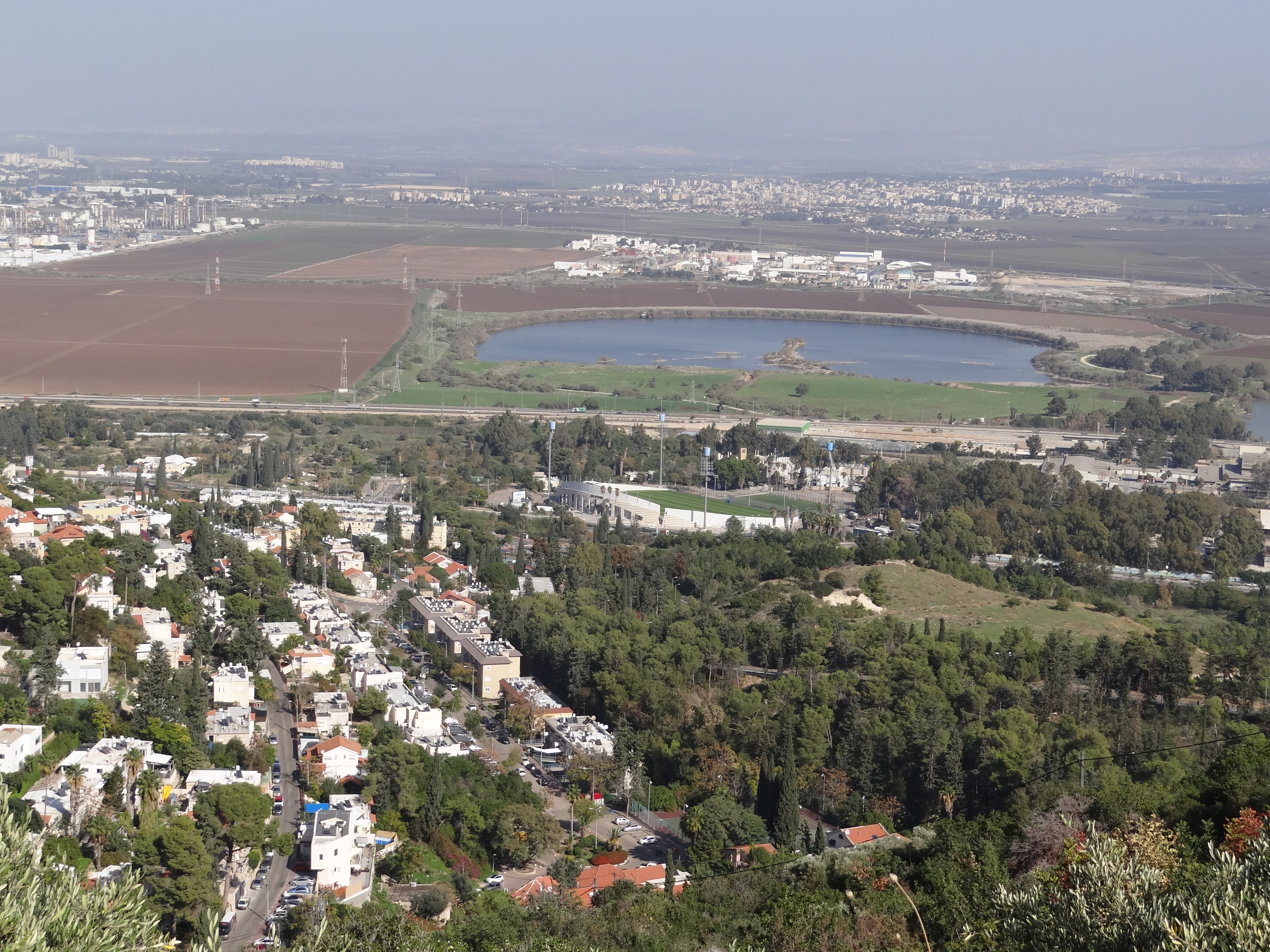 תצפית על גבעת העמדות וגבעת נשר מכביש 7212, על הגבעה שוכנים שרידי בונקרים ממלחמת העולם השנייה מתקופת המנדט הבריטי ועמדות תותחים ששימשו להגנה על האזור כנגד התקפות אוויריות.